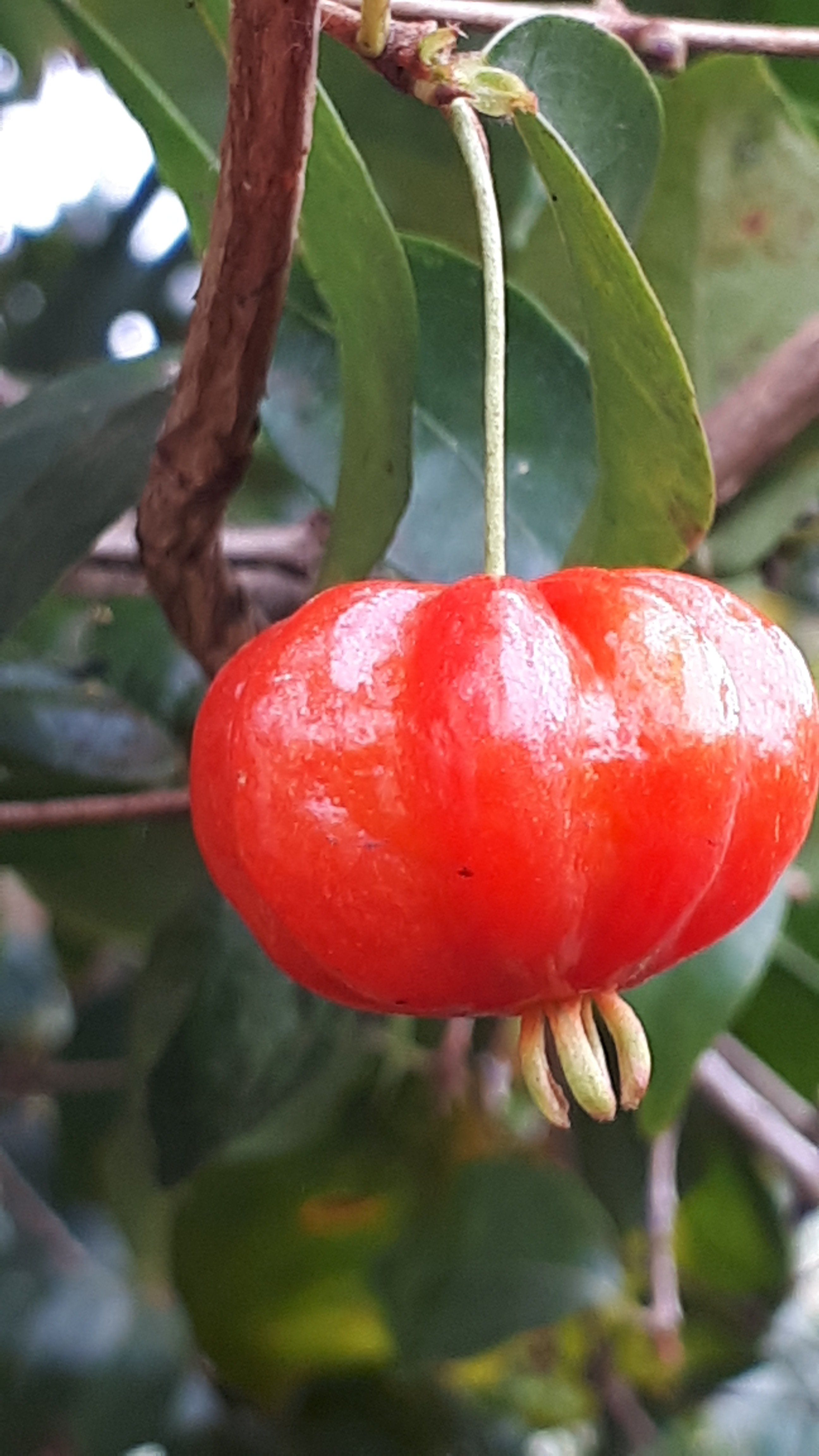 Pitanga madura fotografada na cidade de Ribeirão Preto - SP.